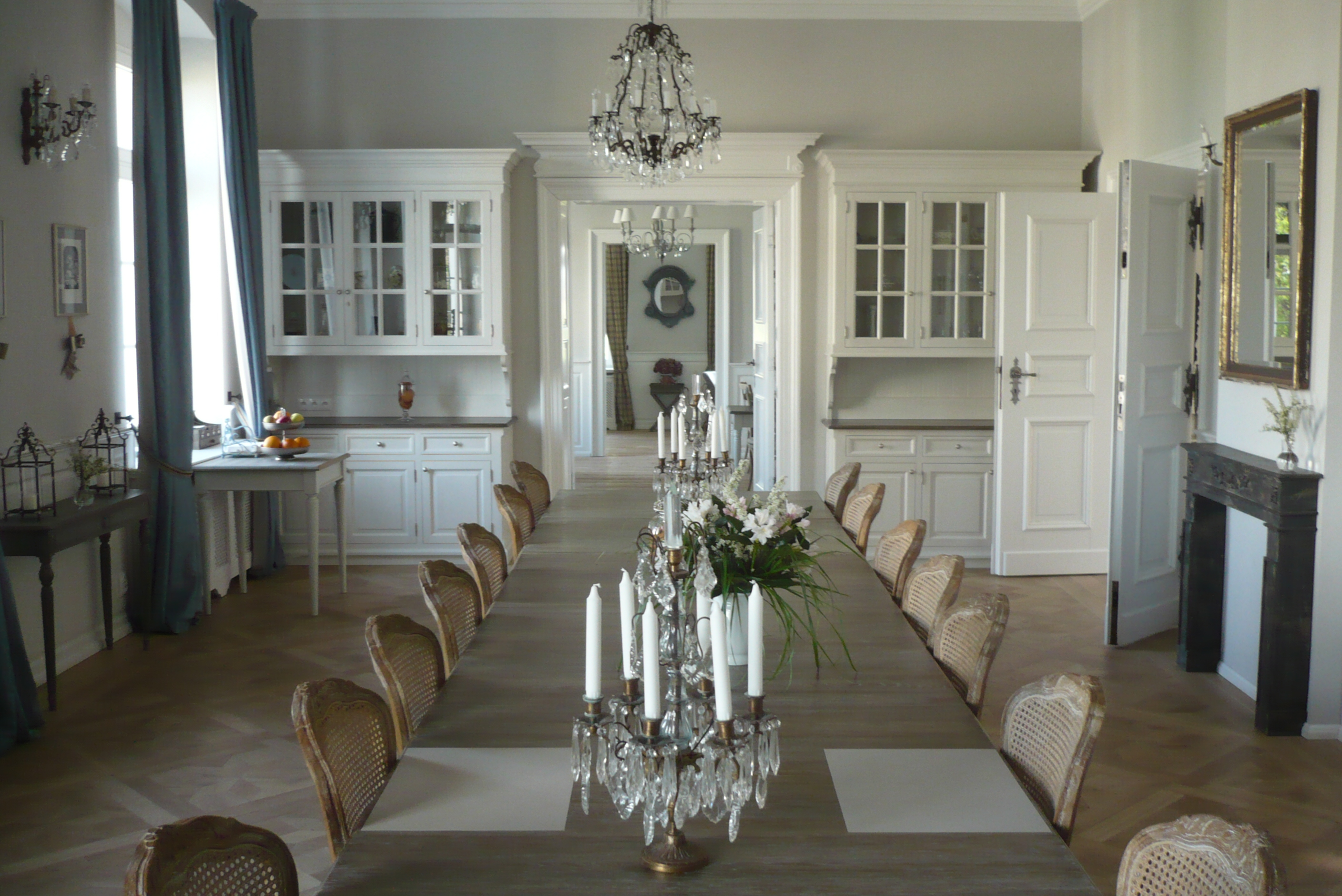 Kamieniec.Sala